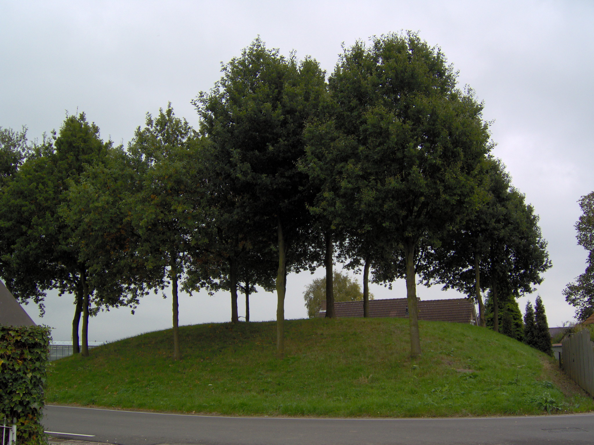 eigen foto